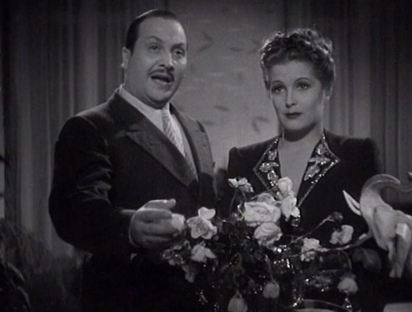 Screenshot dal film Un marito per il mese d'aprile (1941)